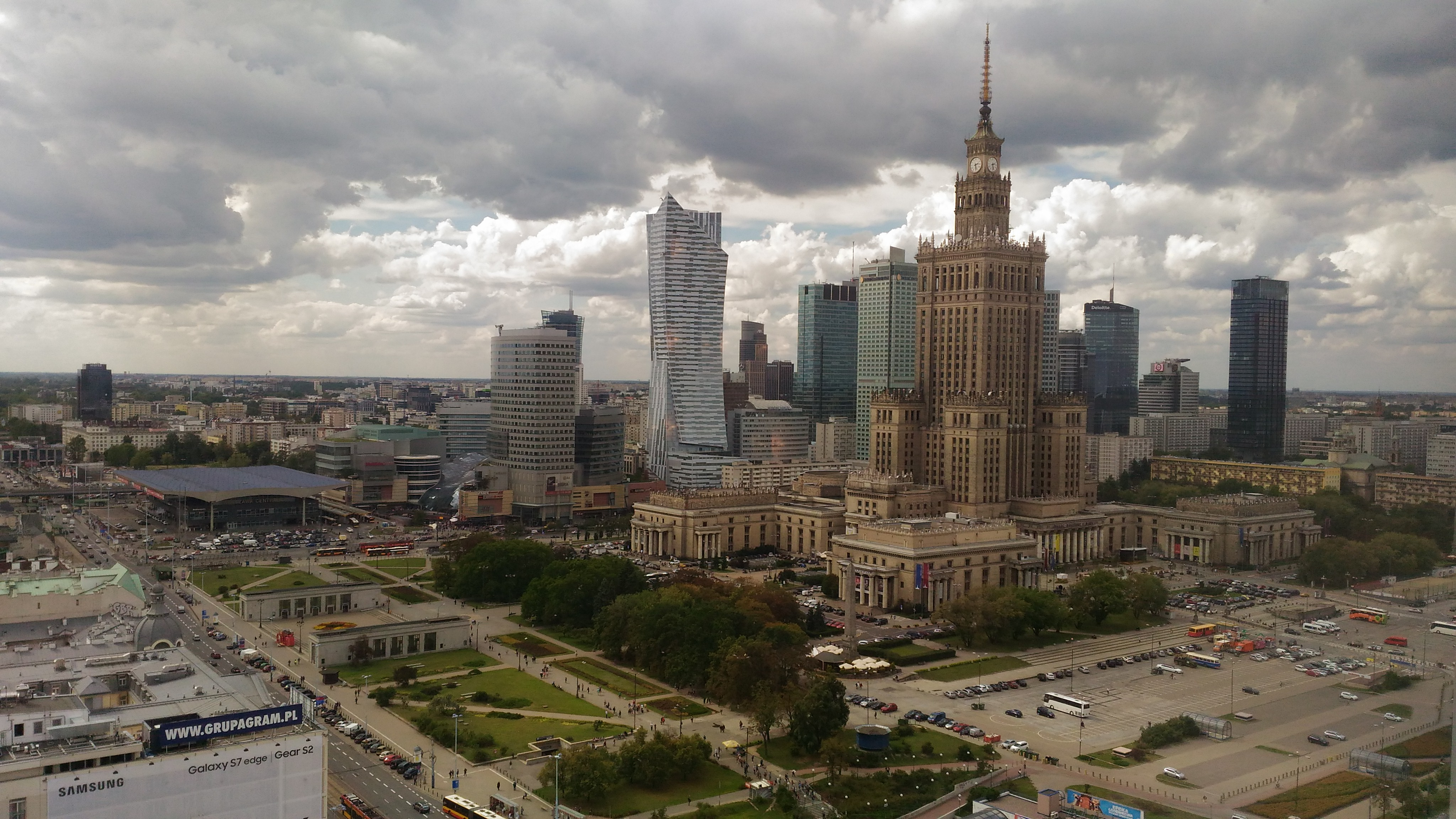 varsovia